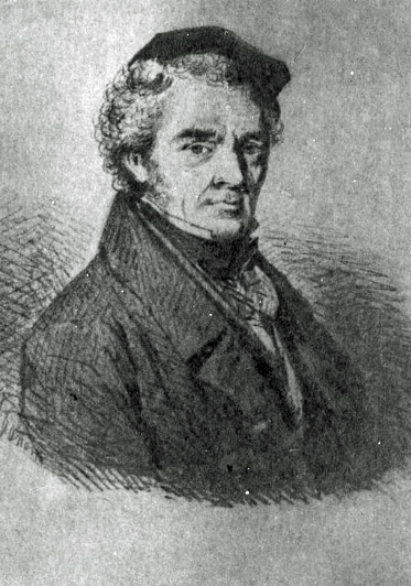 Portret van Casparis Haanen (1778-1849)